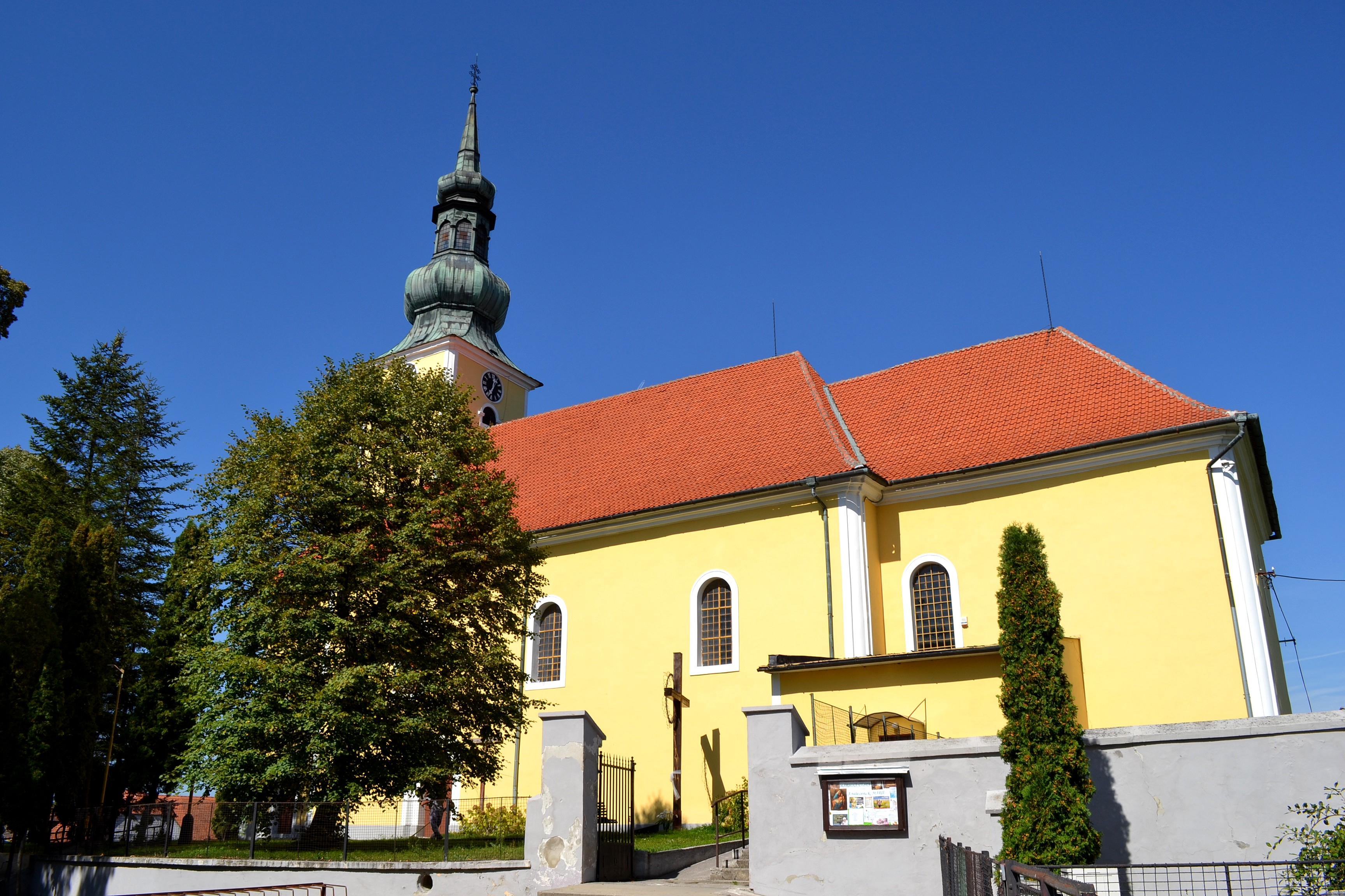 Borský Mikuláš (okr. Senica), Kostol svätého Mikuláša; celkový pohľad z juhu